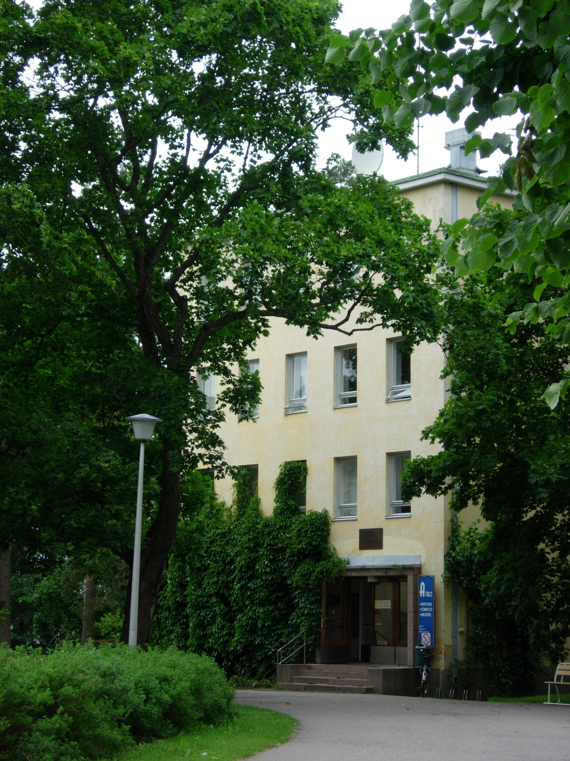 Lapinjärven koulutuskeskuksen päärakennus, A-talo. Respa, toimistot, majoitustiloja, ATK-opetushuone.